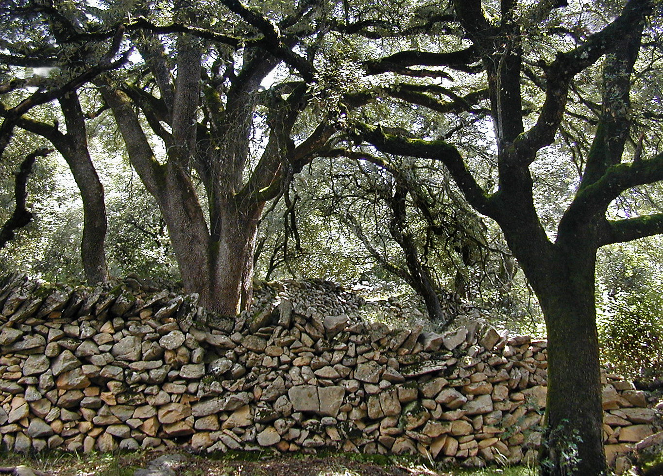 Al segle XI, a Rin de la Carrasca (municipi d'Isàvena) de la Ribagorça aragonesa, hi havia corrals de pedra